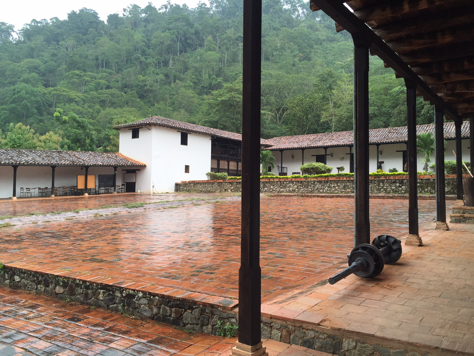 Hacienda La Victoria, sede del Museo del Café y de los inmigrantes, en el estado Mérida, Venezuela.